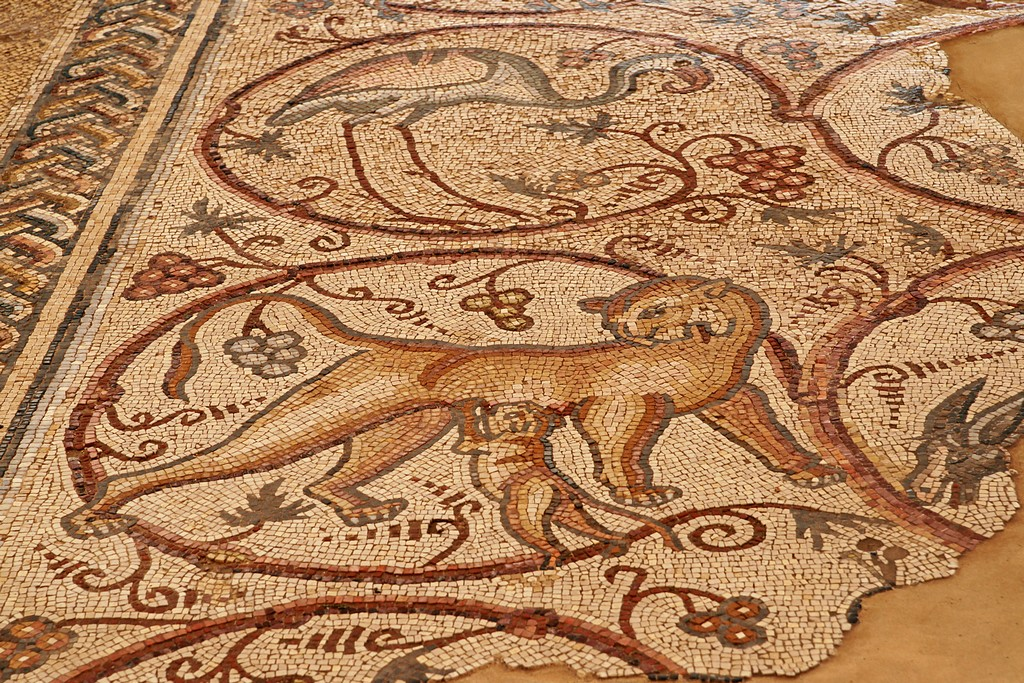 Good Samaritan Inn, Mosaikmuseum: Wildtiere